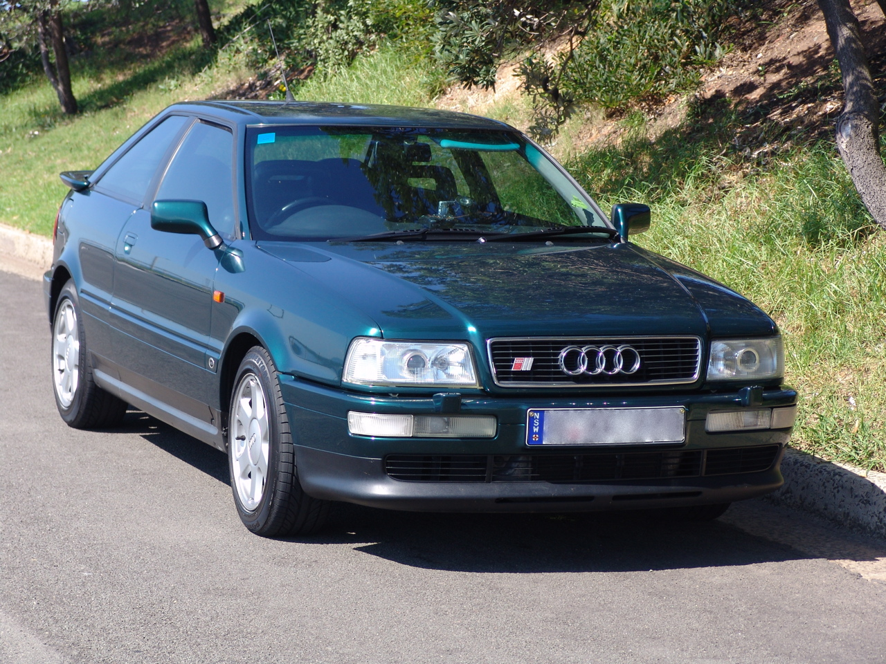 A green 1994 Audi S2. (David Banes